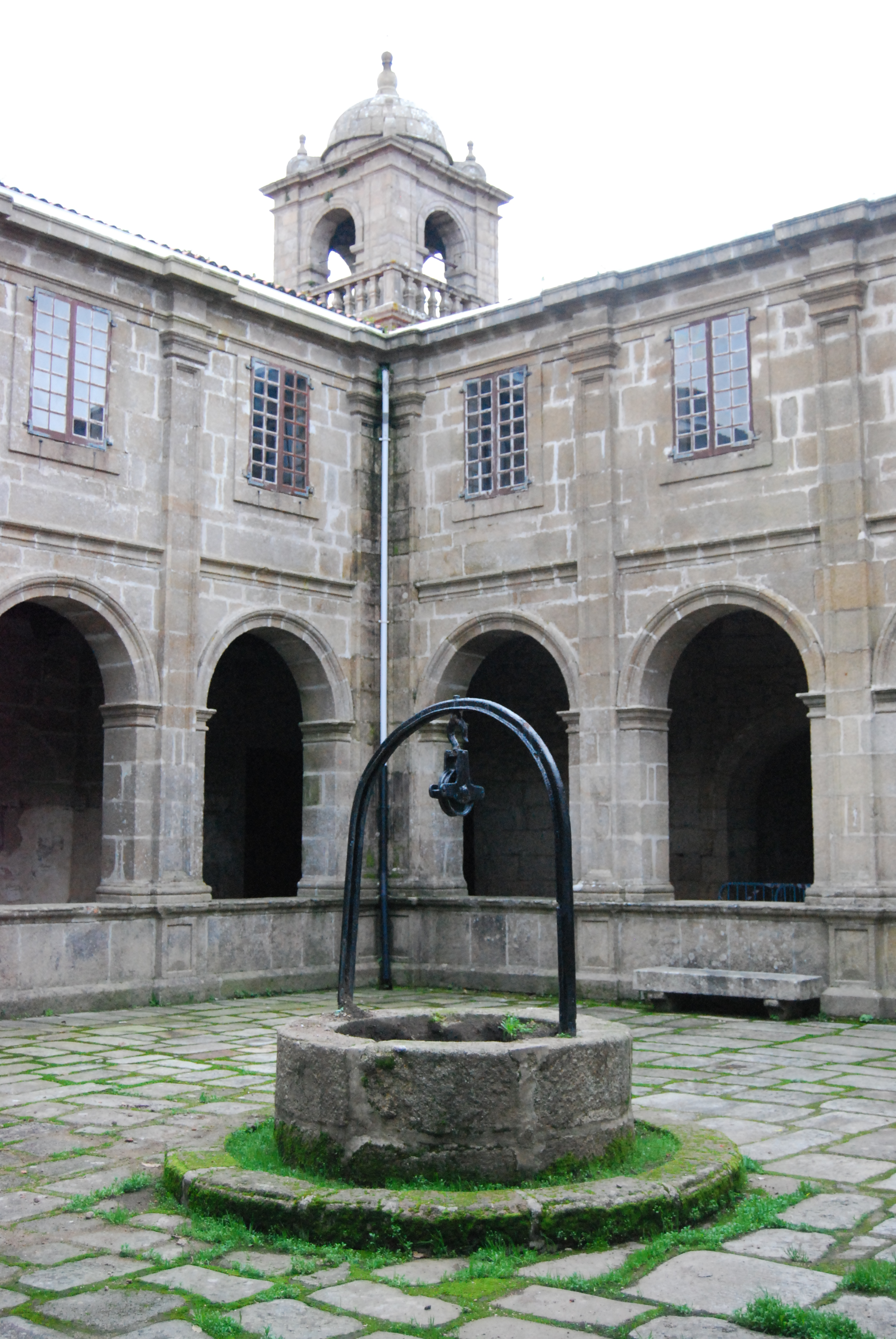 Mosteiro de Santa Catalina de Montefaro, situado na parroquia de Cervás do concello de Ares, foi fundado cara ao ano 1145 polo Conde Pedro de Osorio, da casa dos Traba, pasando logo baixo o mecenado dos Andrade.